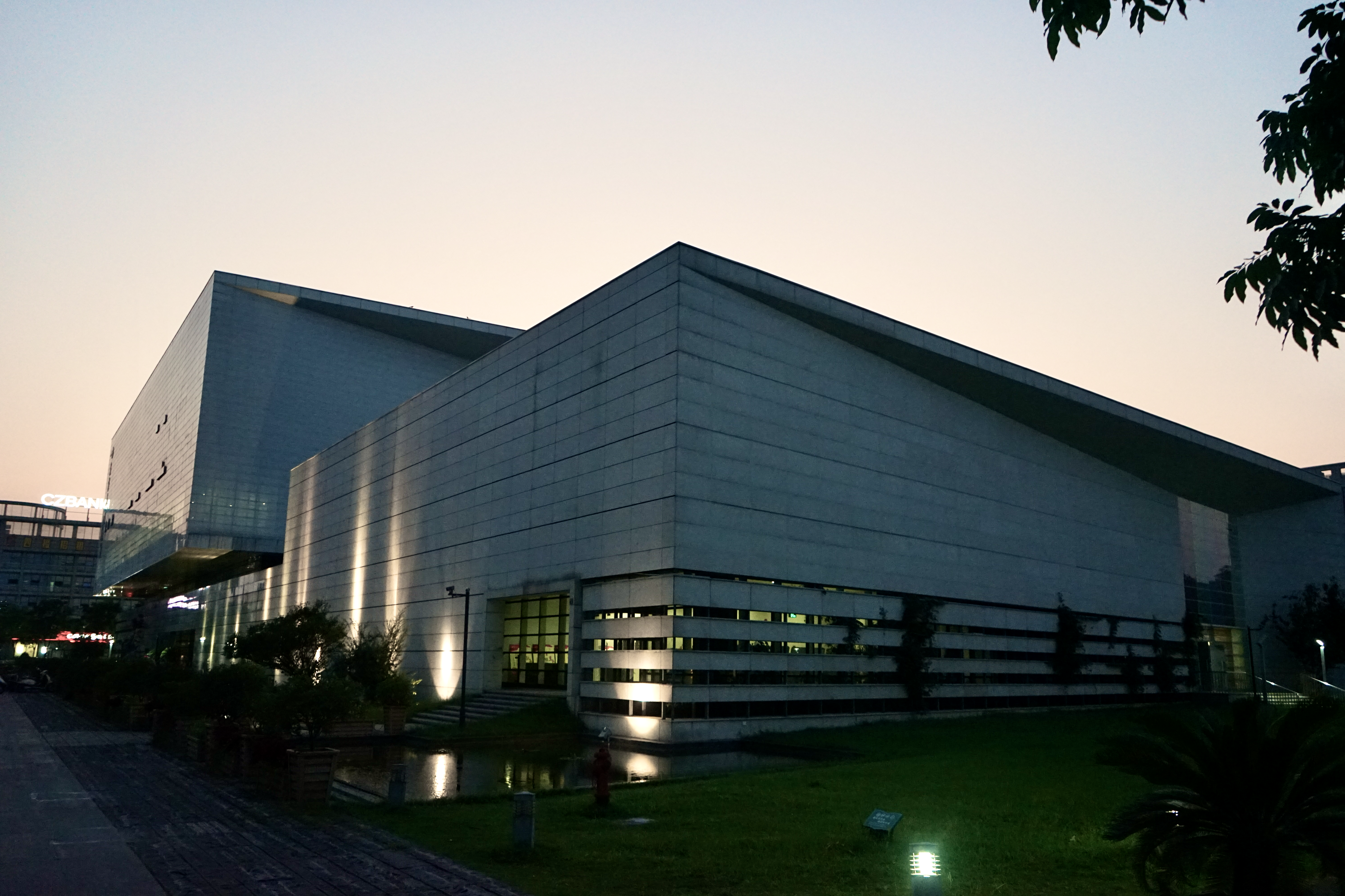 中文（中国大陆）: 海宁图书馆